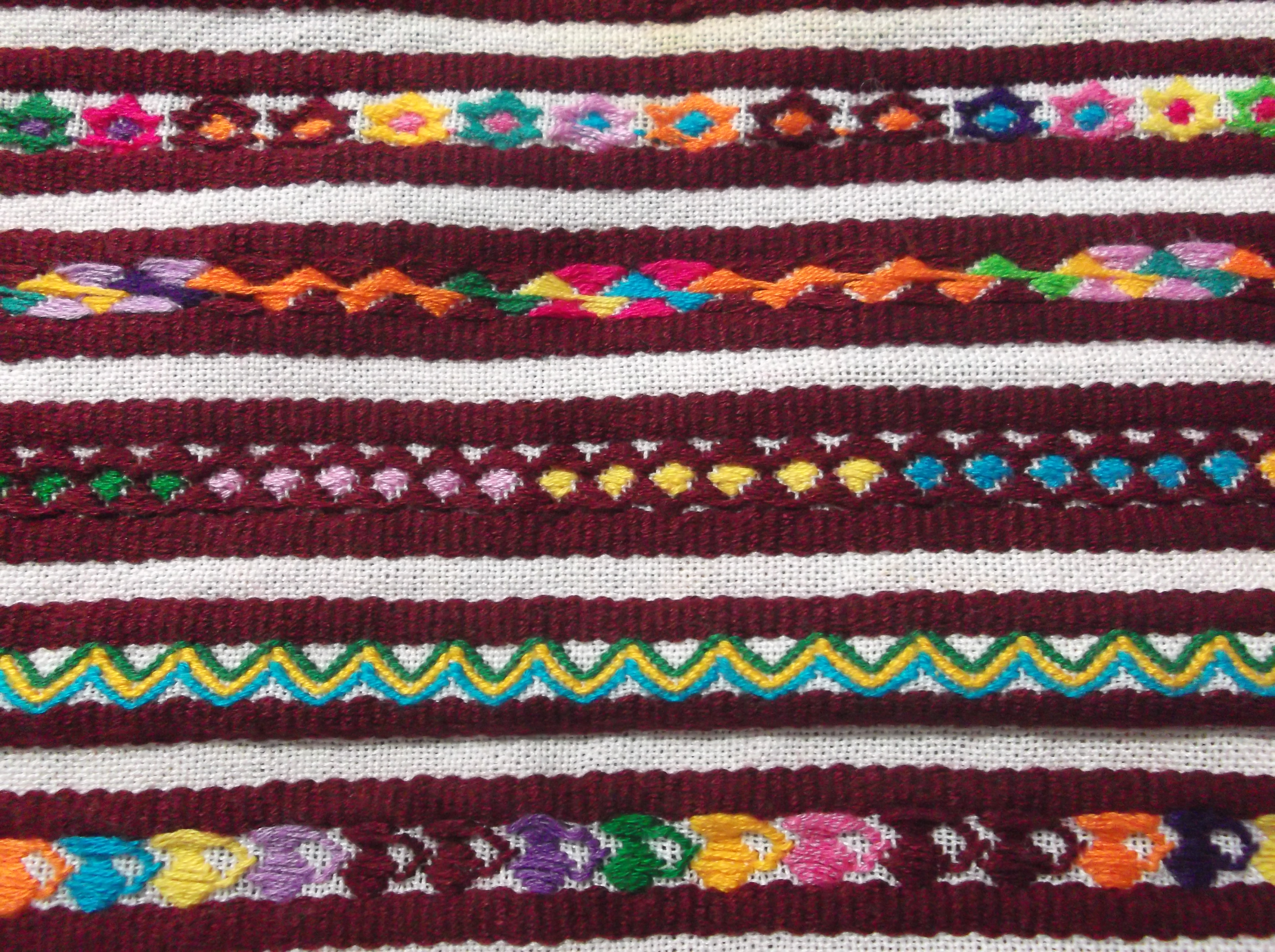 Diseños para huipiles y servilletas.